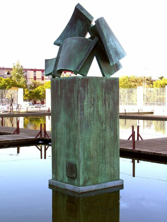 Carlos Albert. Eolo, 2006. Excmo. Ayuntamiento de San Fernando. Cádiz.